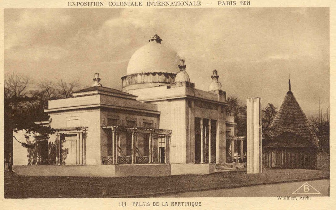 Pavillon de la Martinique à l'Exposition Coloniale de PARIS en 1931